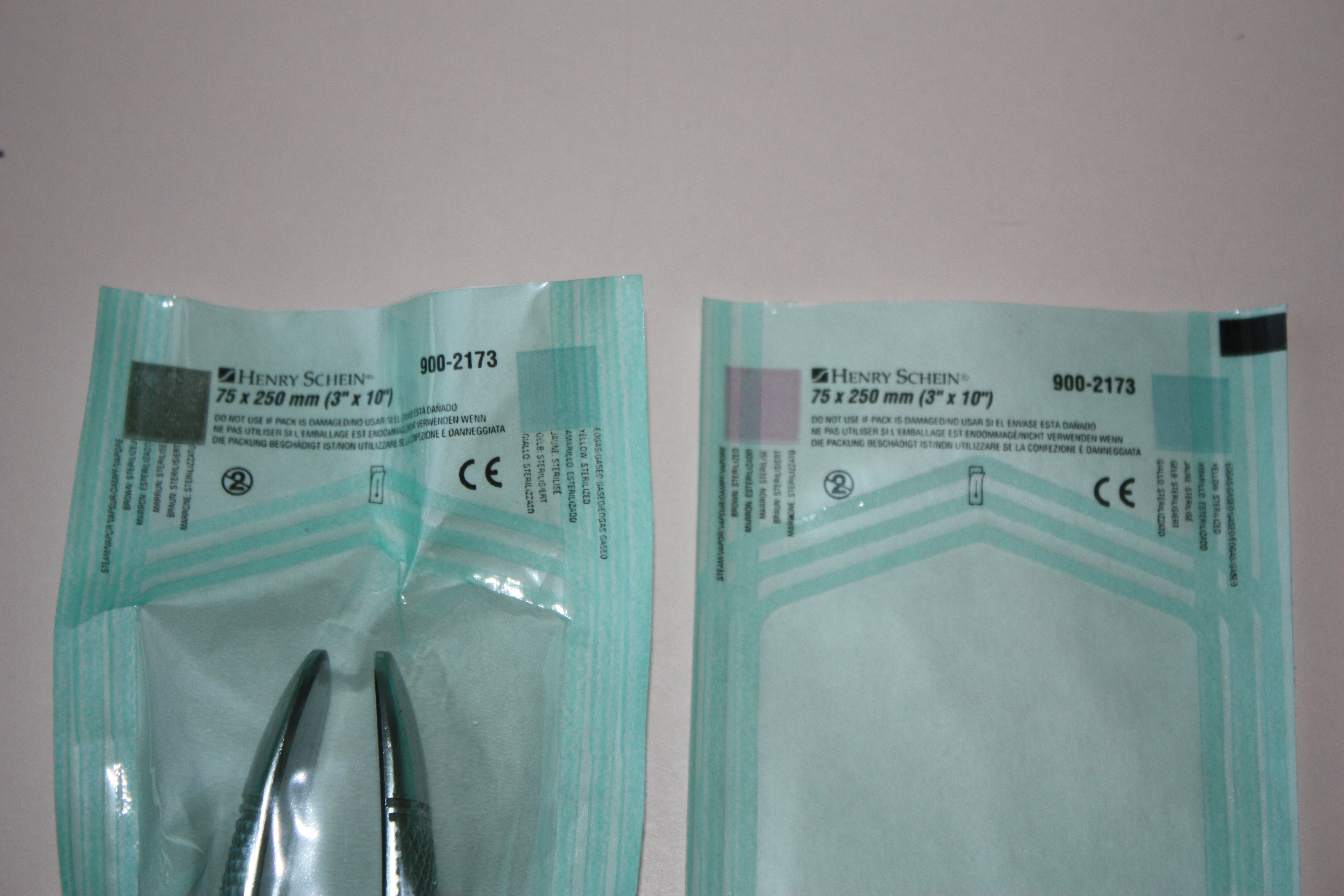 Sterilisation